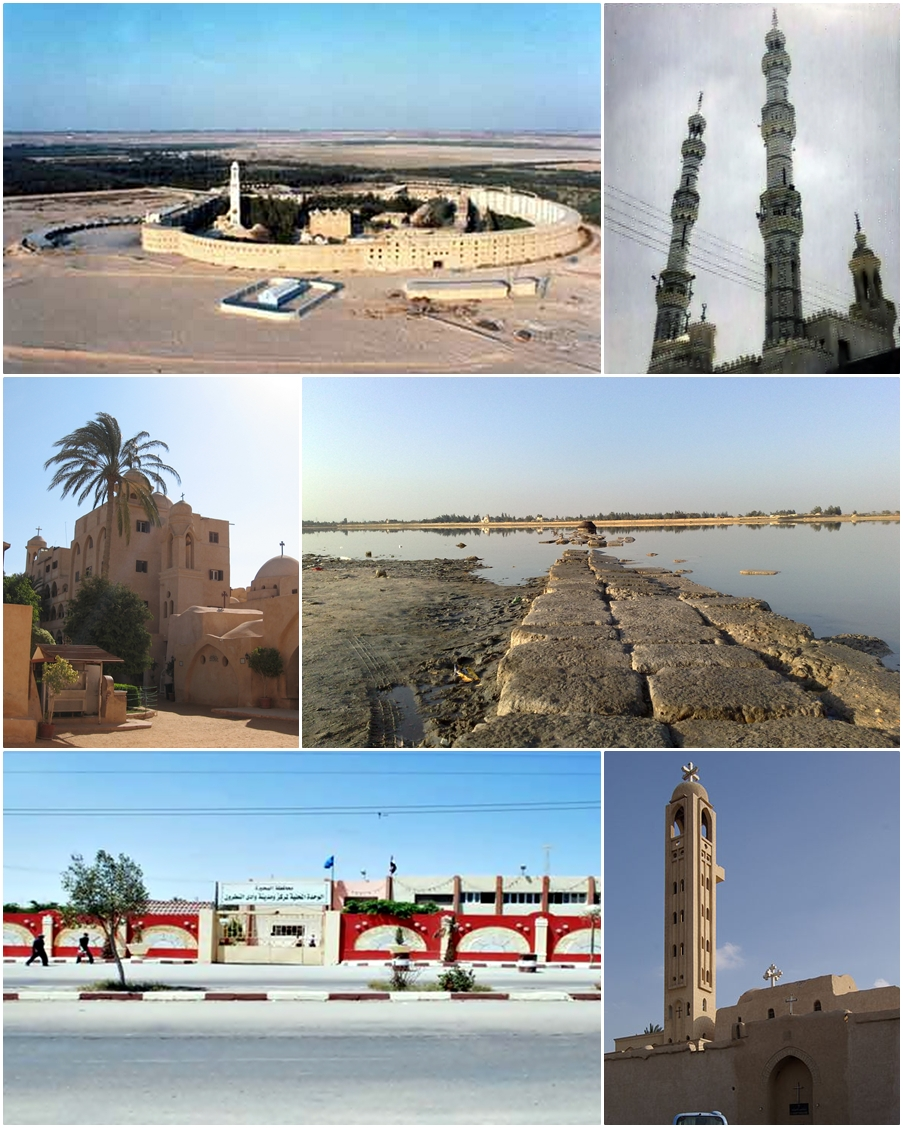 مجموعة صور لوادي النطرون